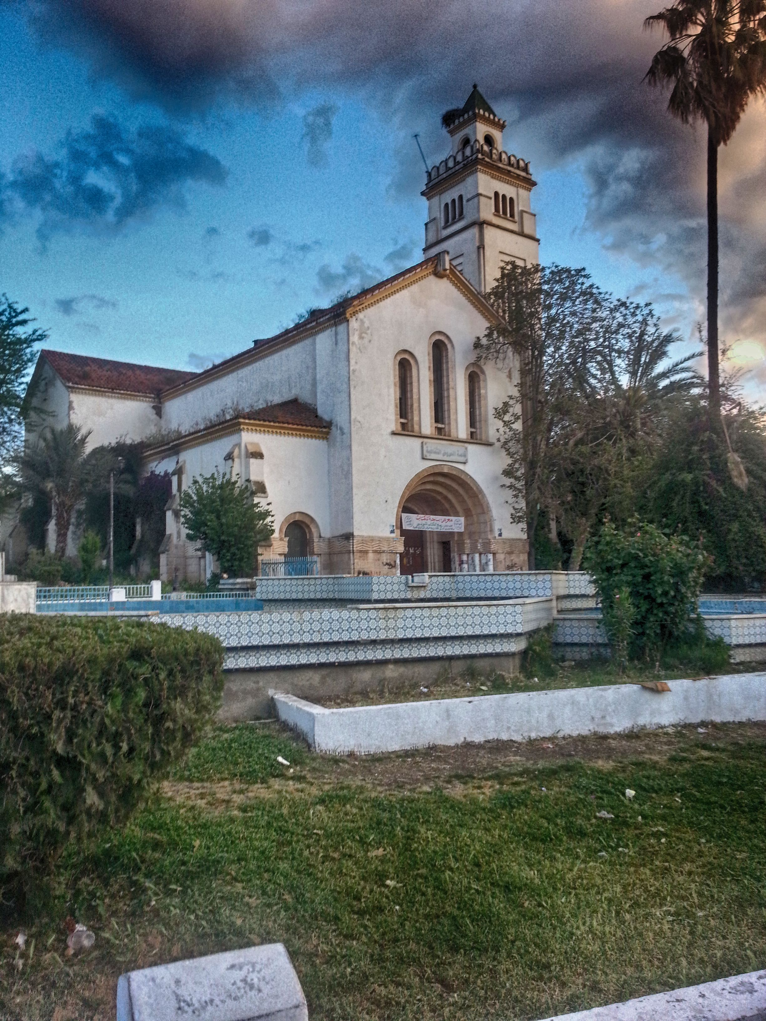 Ancienne église de Béja (2015)